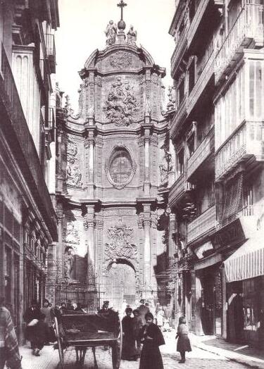 Porta dels Ferros, Seu de València, 1906